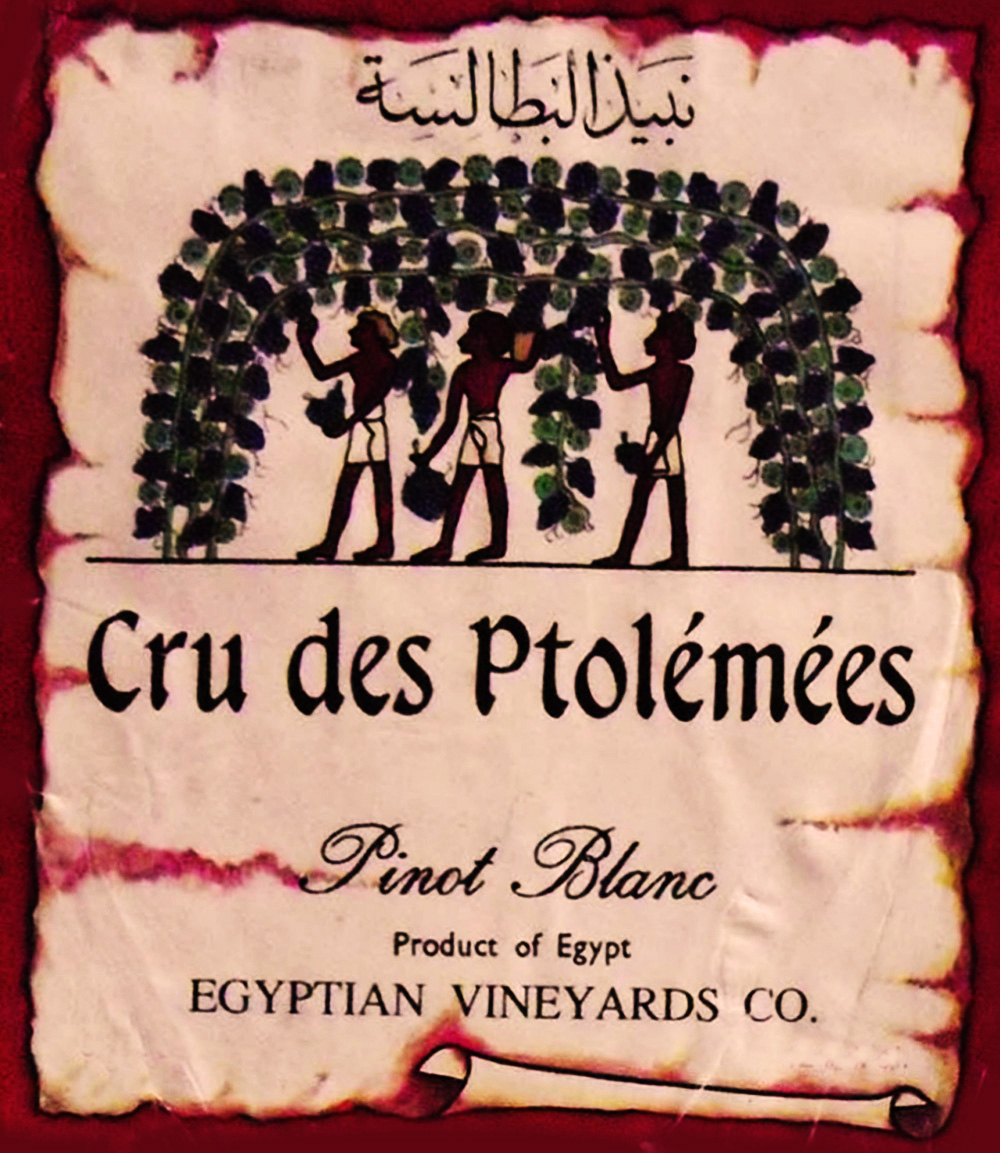 Cru des Ptolémées